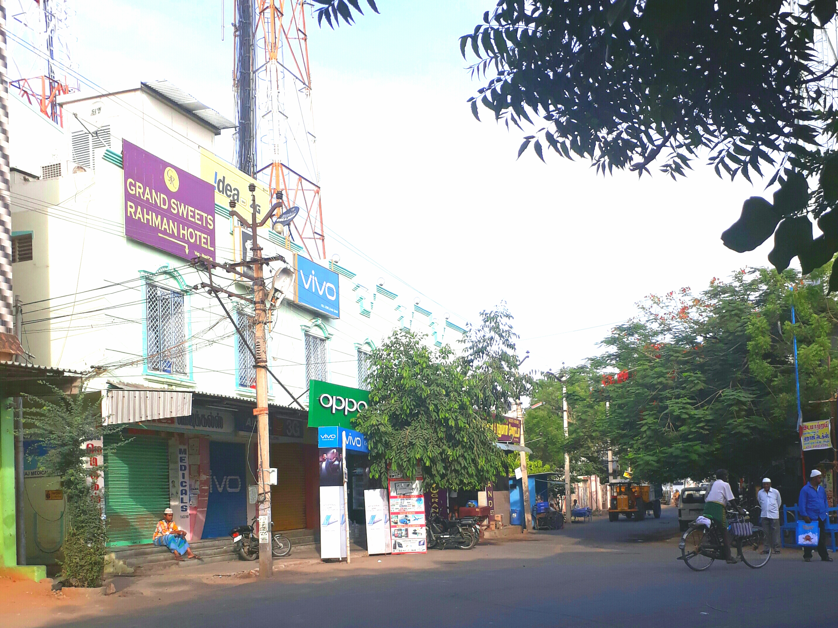 ஷாநகர் பகுதி